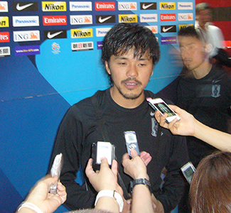 Shinzo Koroki